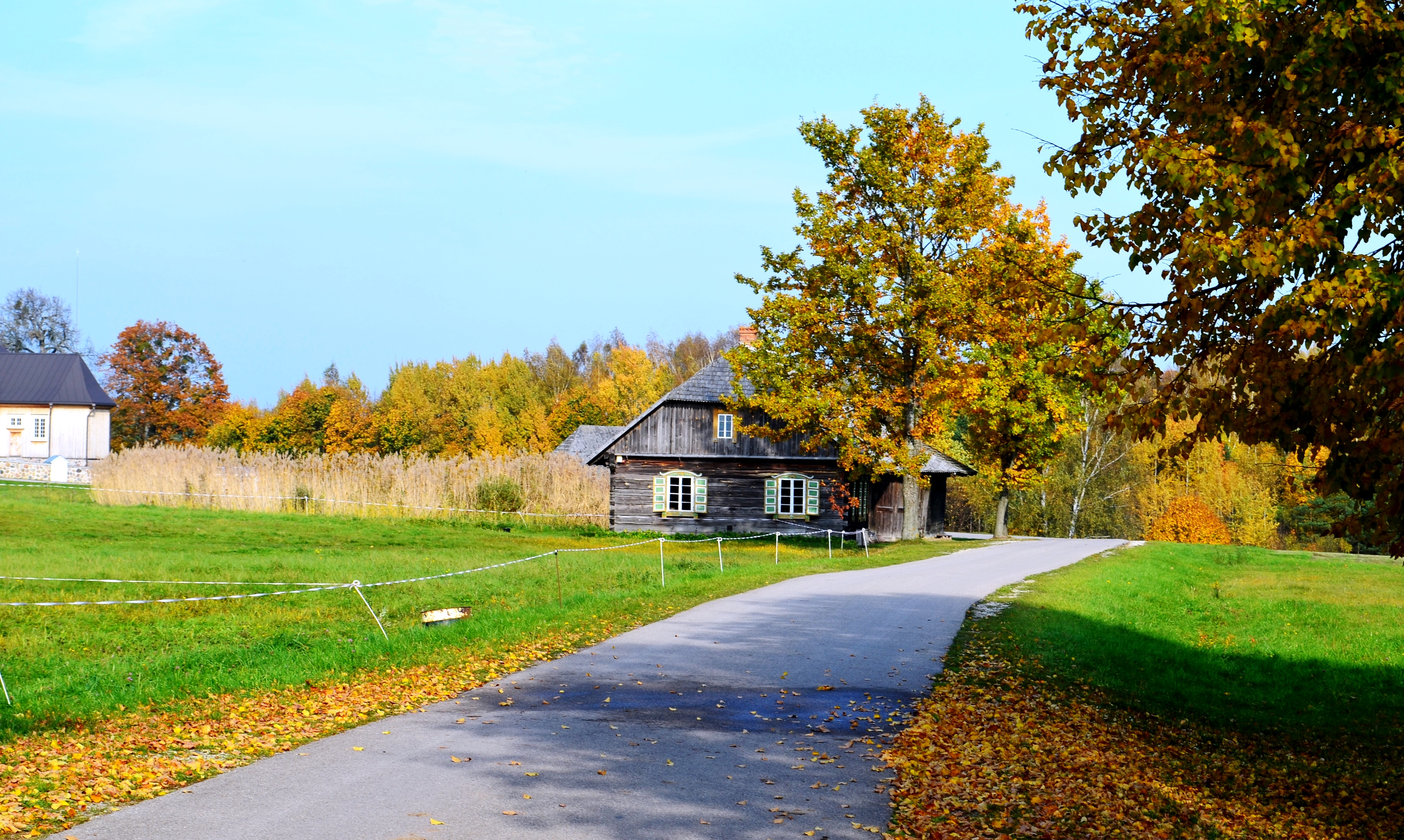 Užbradumės karčema, Rumšiškių muziejus